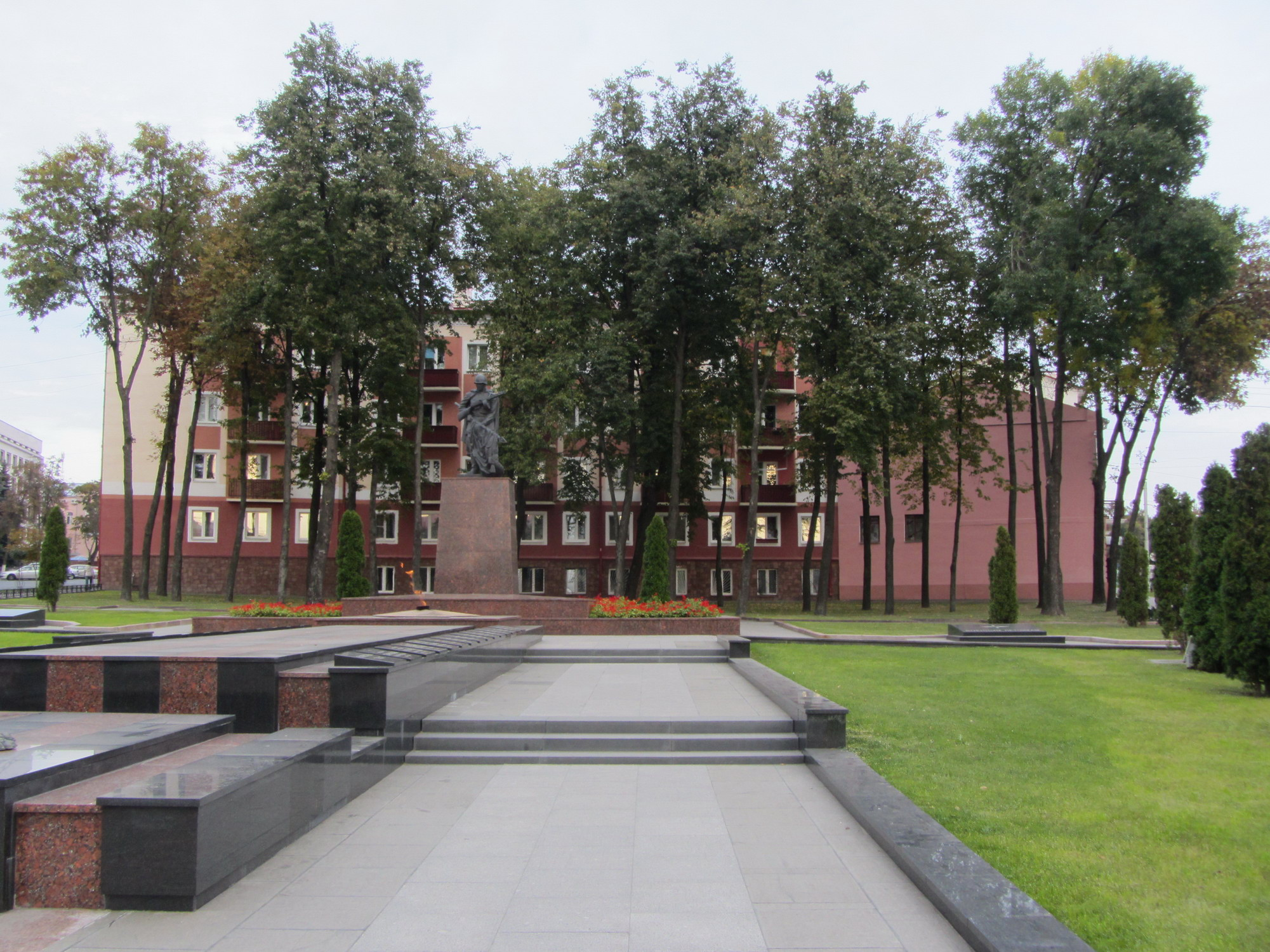 Беларуская (тарашкевіца): Братэрская магіла. г. Гомель This is a photo of Belarusian heritage monument. Reference number: 313Д000062 ( WLM)